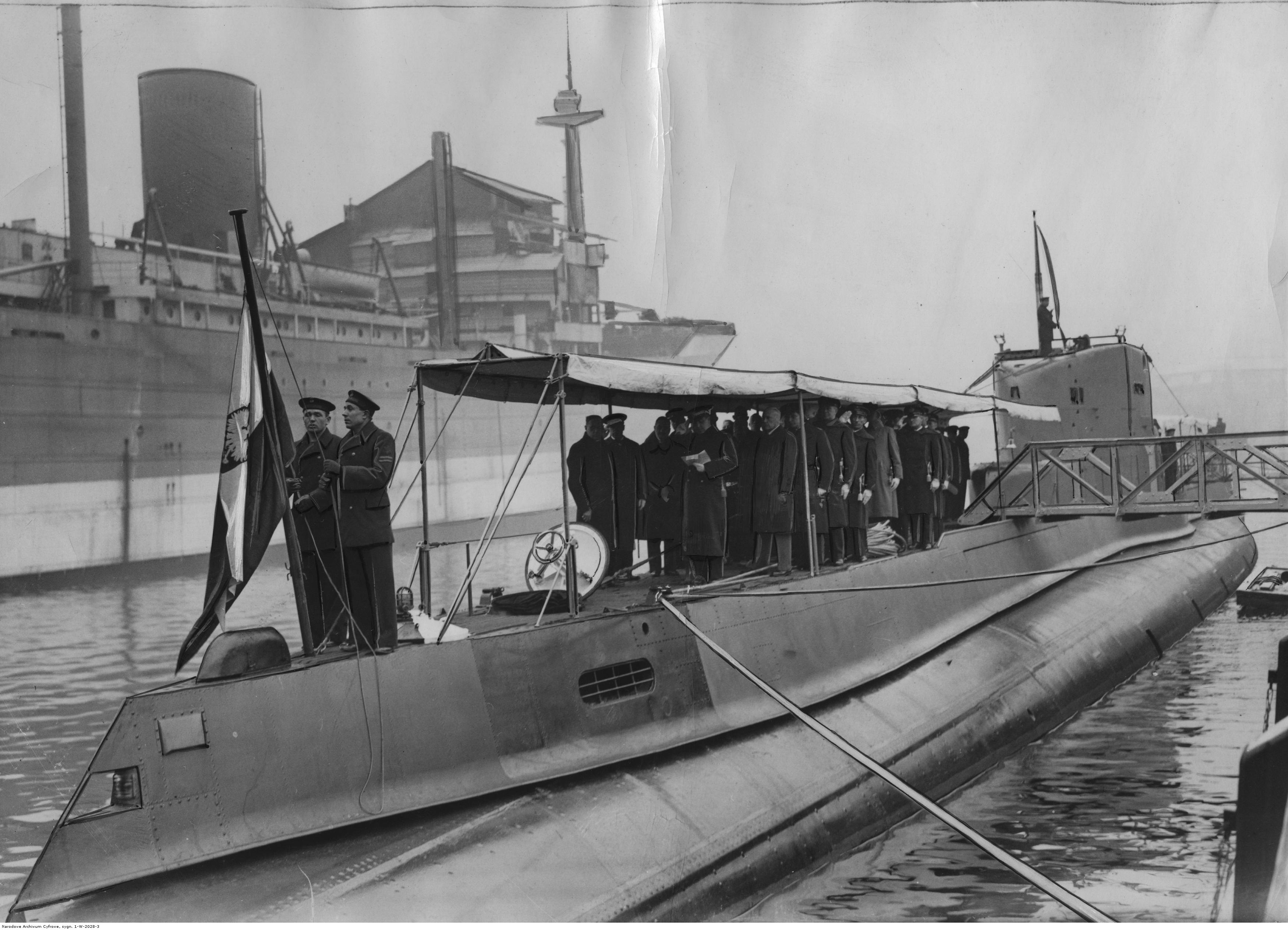 Uroczyste podniesienie bandery okrętu podwodnego ORP "Orzeł". Holandia, Vlissingen.